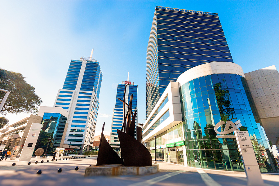 Всемирный торговый центр в Монтевидео